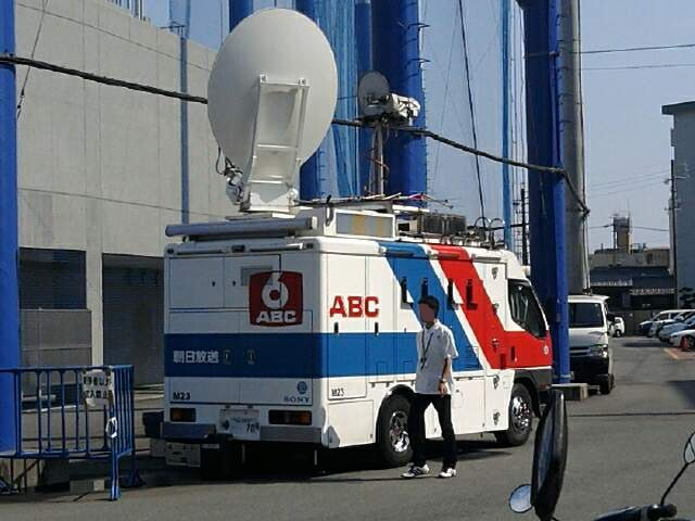 2012年6月6日、3代目「ABC」ロゴと6マークが付けられたままの朝日放送テレビ中継車。中日ドラゴンズ対阪神タイガース（ウエスタンリーグ）のスカイA+での中継のためナゴヤ球場に派遣。